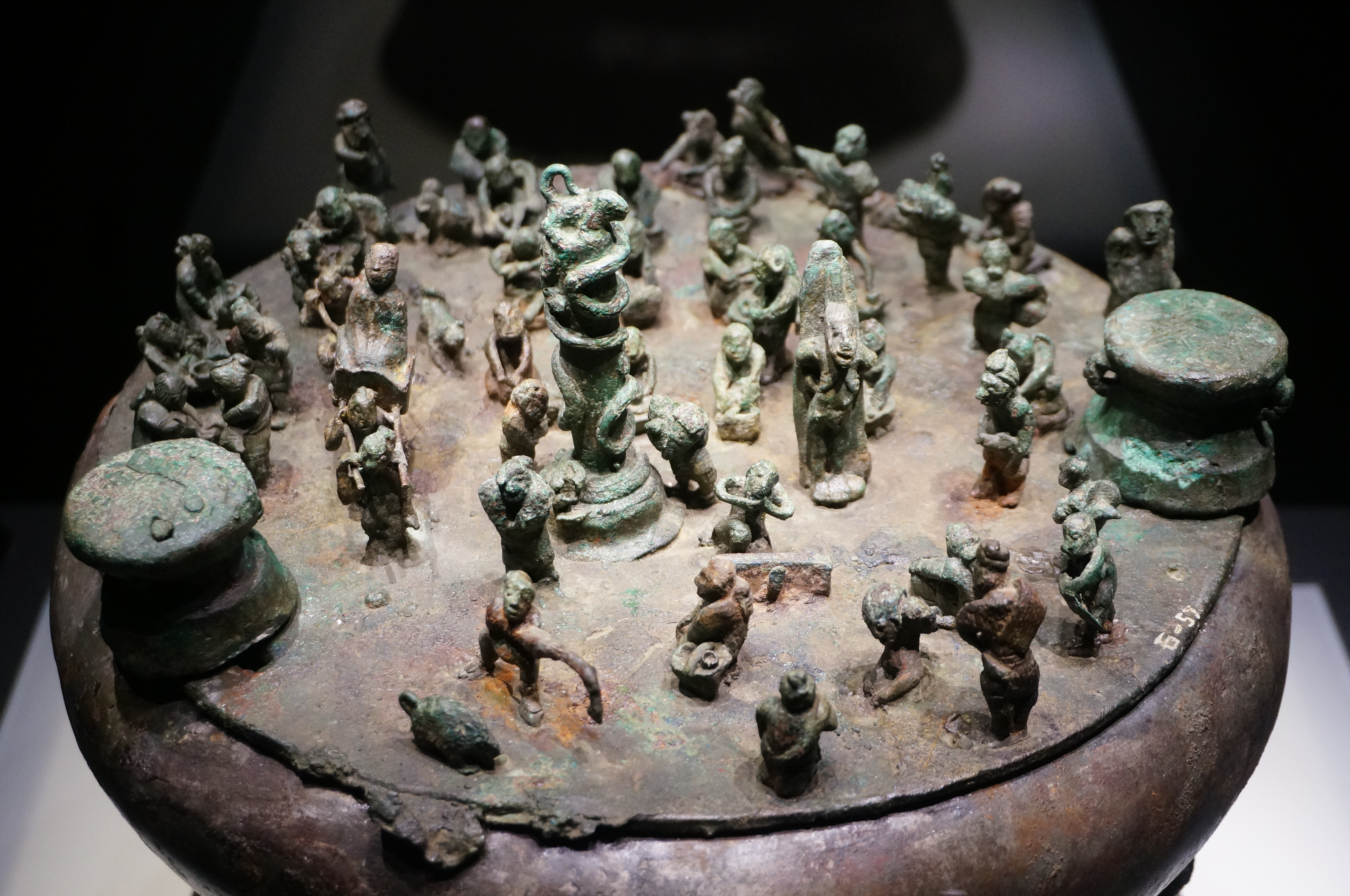 杀人祭柱铜贮贝器，西汉，晋宁县石寨山出土，云南省博物馆藏。